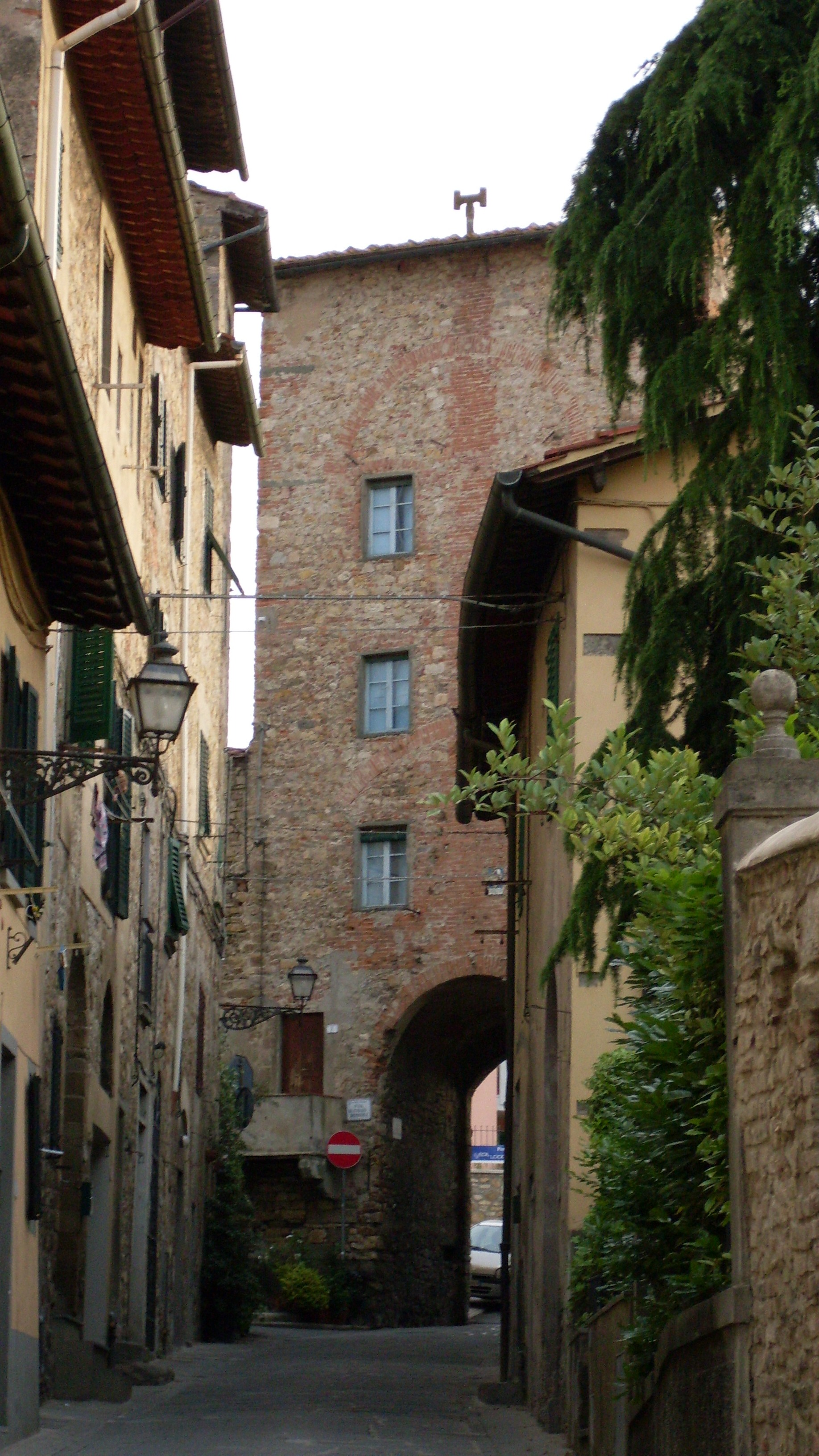 Torre di San Miniato, Signa, Italia